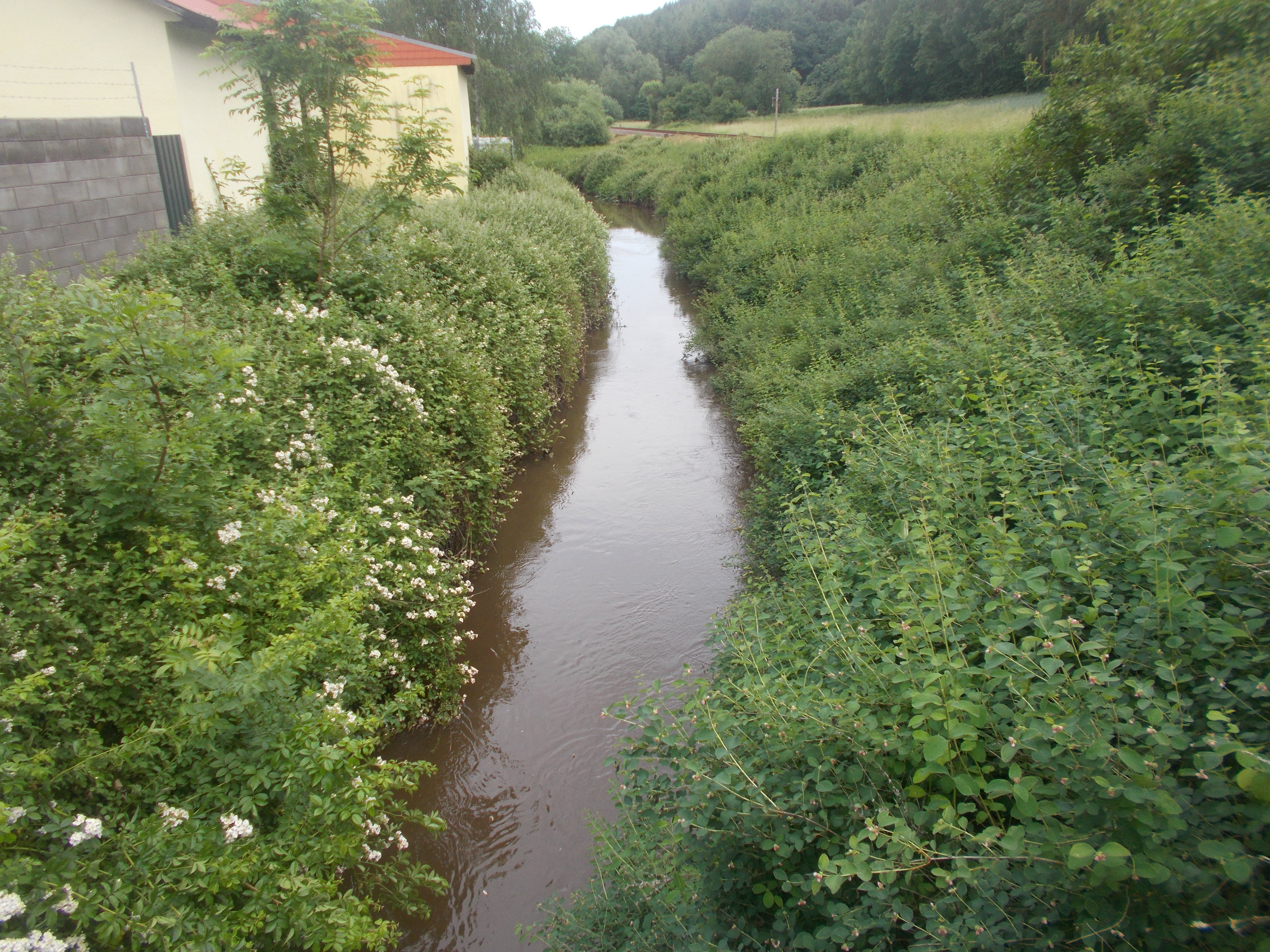 Das Mohrbachtal mit seiner Biodiversität ist Teil des Landstuhler Bruchs, das Naturschutz- und Landschaftsschutzgebiet ist.